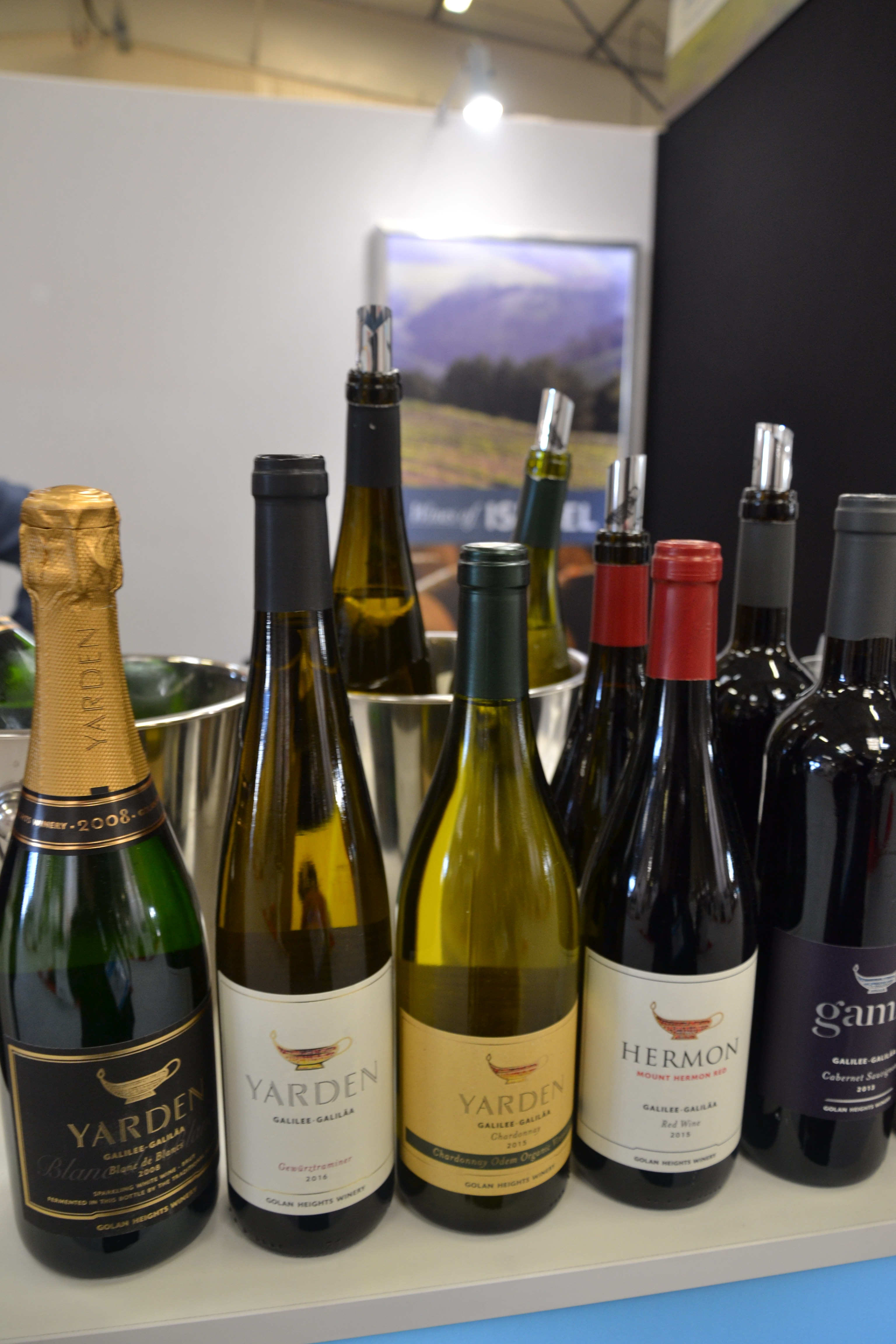 vins israëliens de la région de Galilée